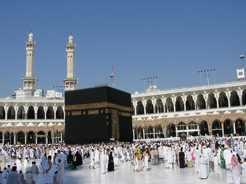 Kaaba, Mekka, Saudi-Arabien